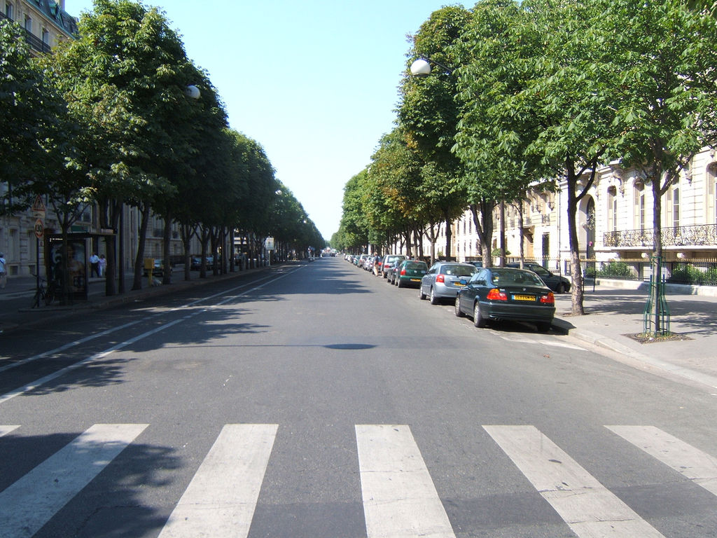 Avenue Montaigne, Paris